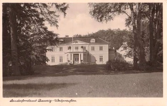 Dwór I, Gdańsk-Oliwa.